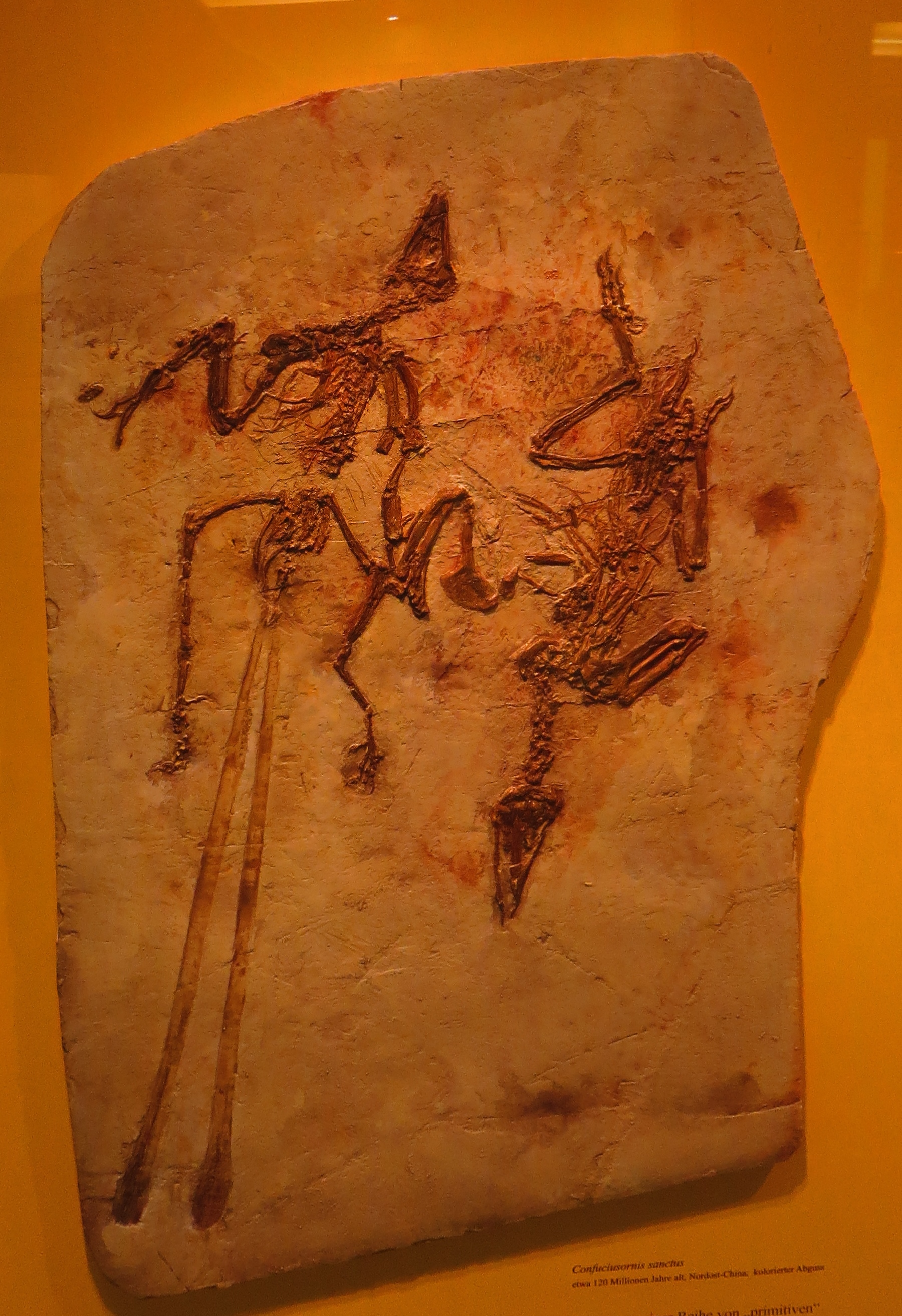 Took the picture at Museum Mensch und Natur, Munchen